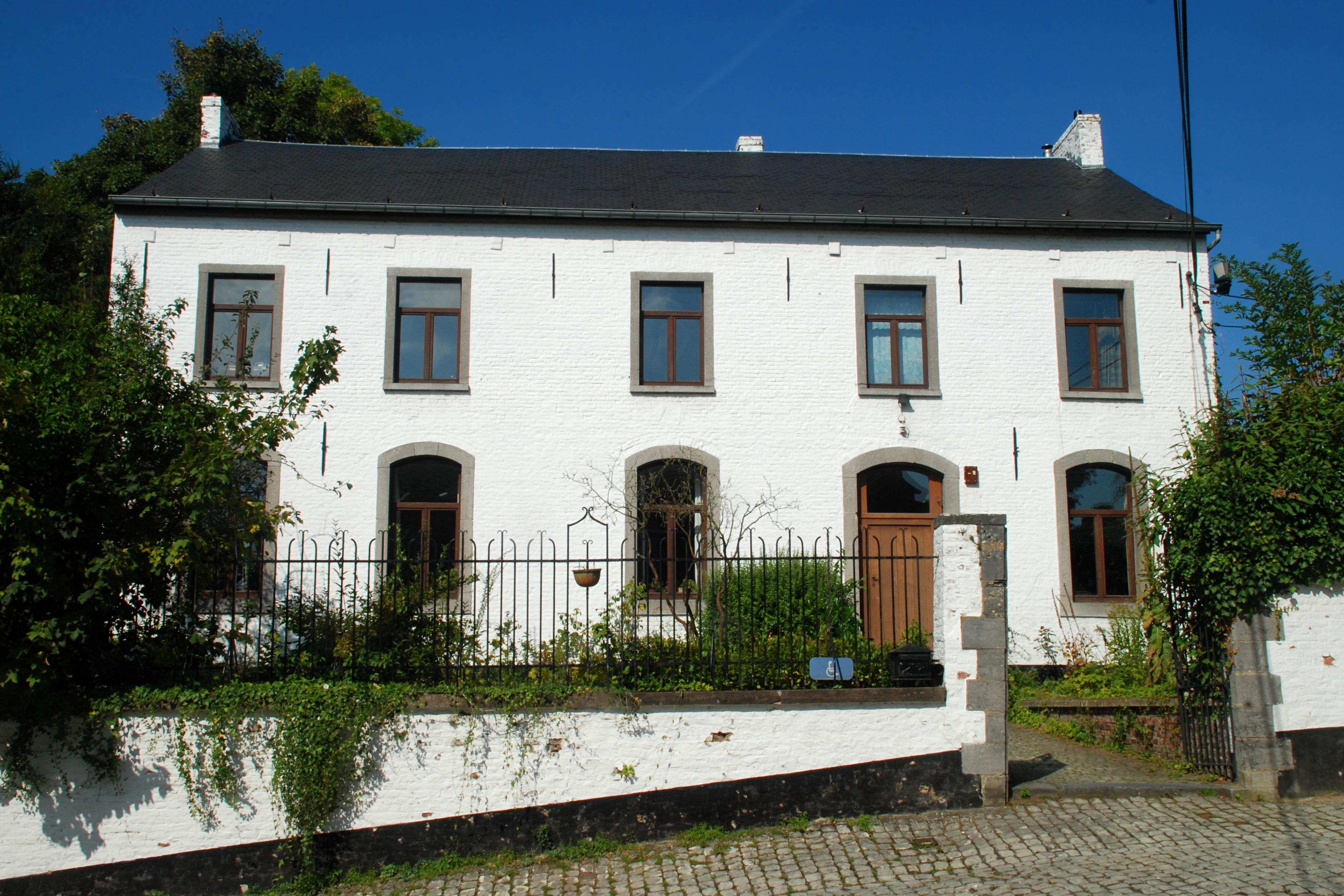 Belgique - Brabant wallon - Église de Court-Saint-Étienne - Cure